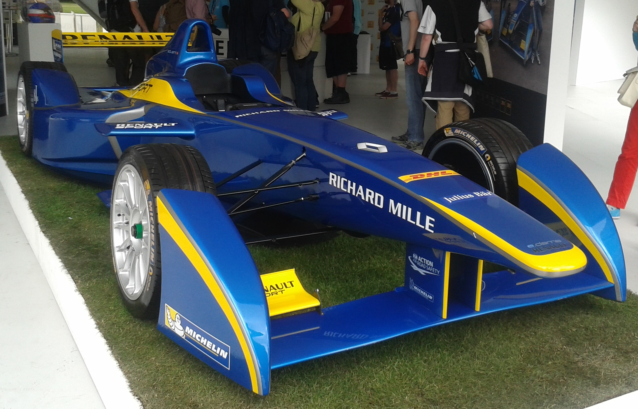 Renault eDAMS Formula E car at Battersea Park circuit, June 2015